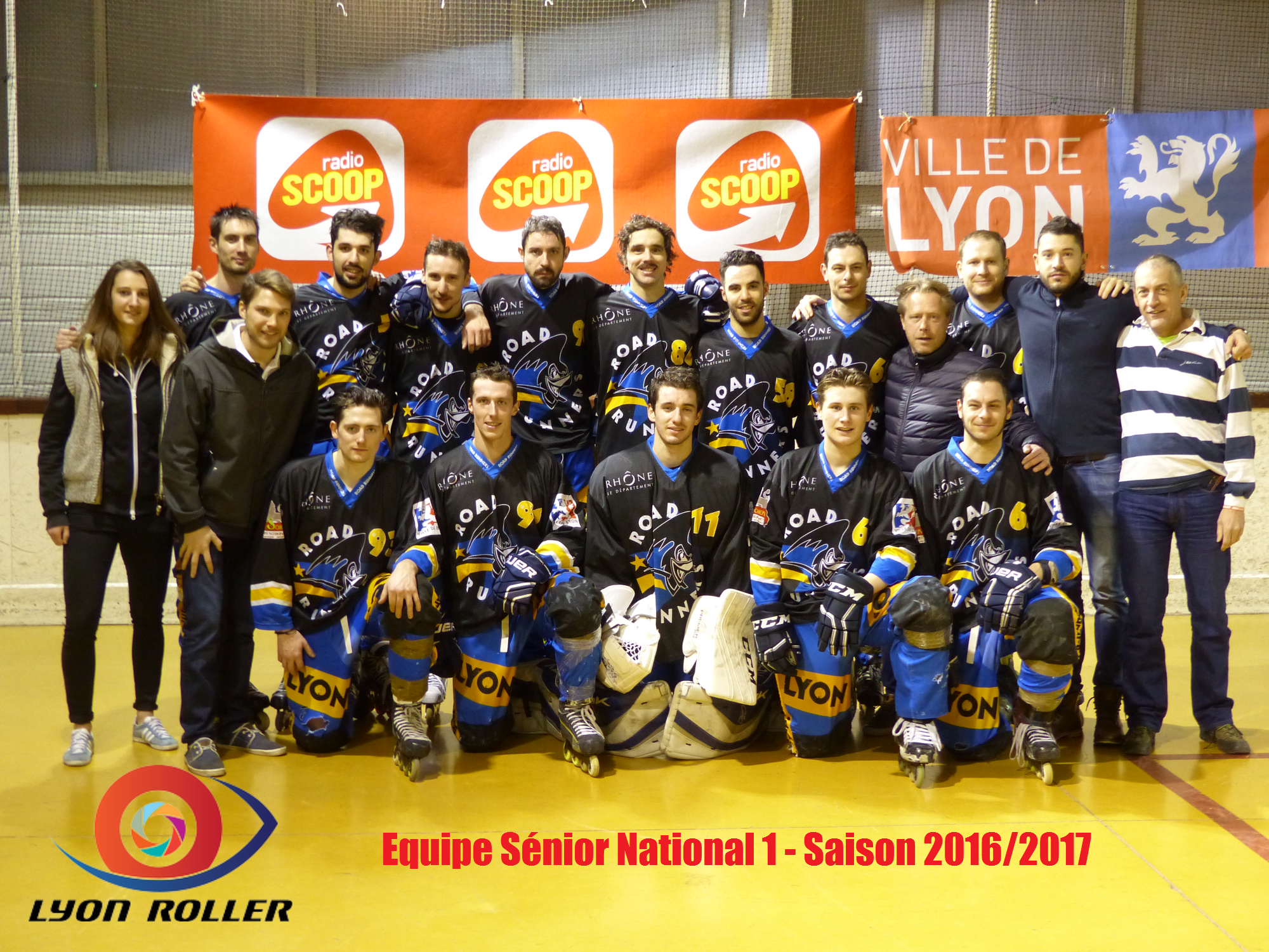 Photo d'équipe N1 20162017